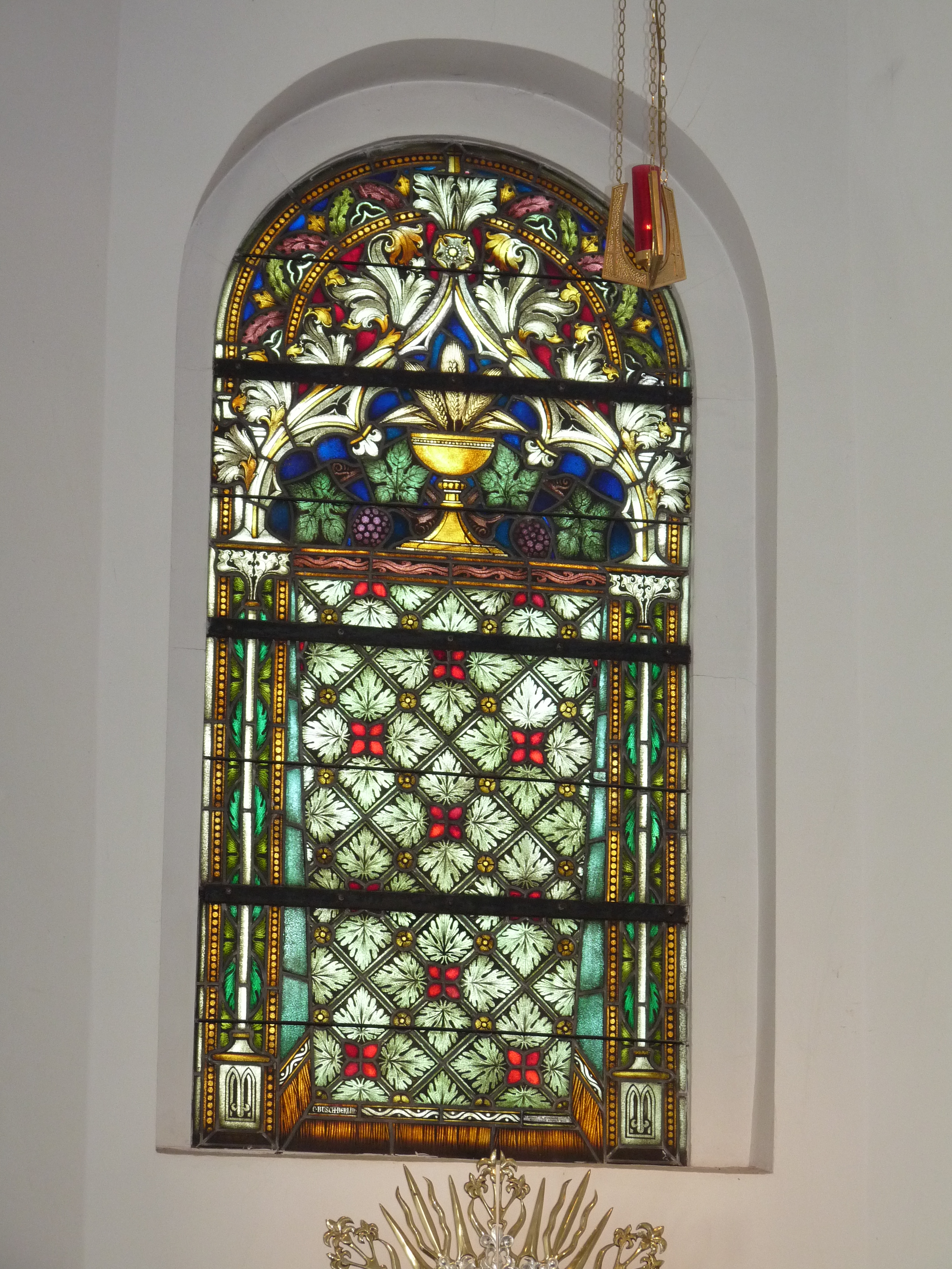 Witraż w gołaszewskim kościele